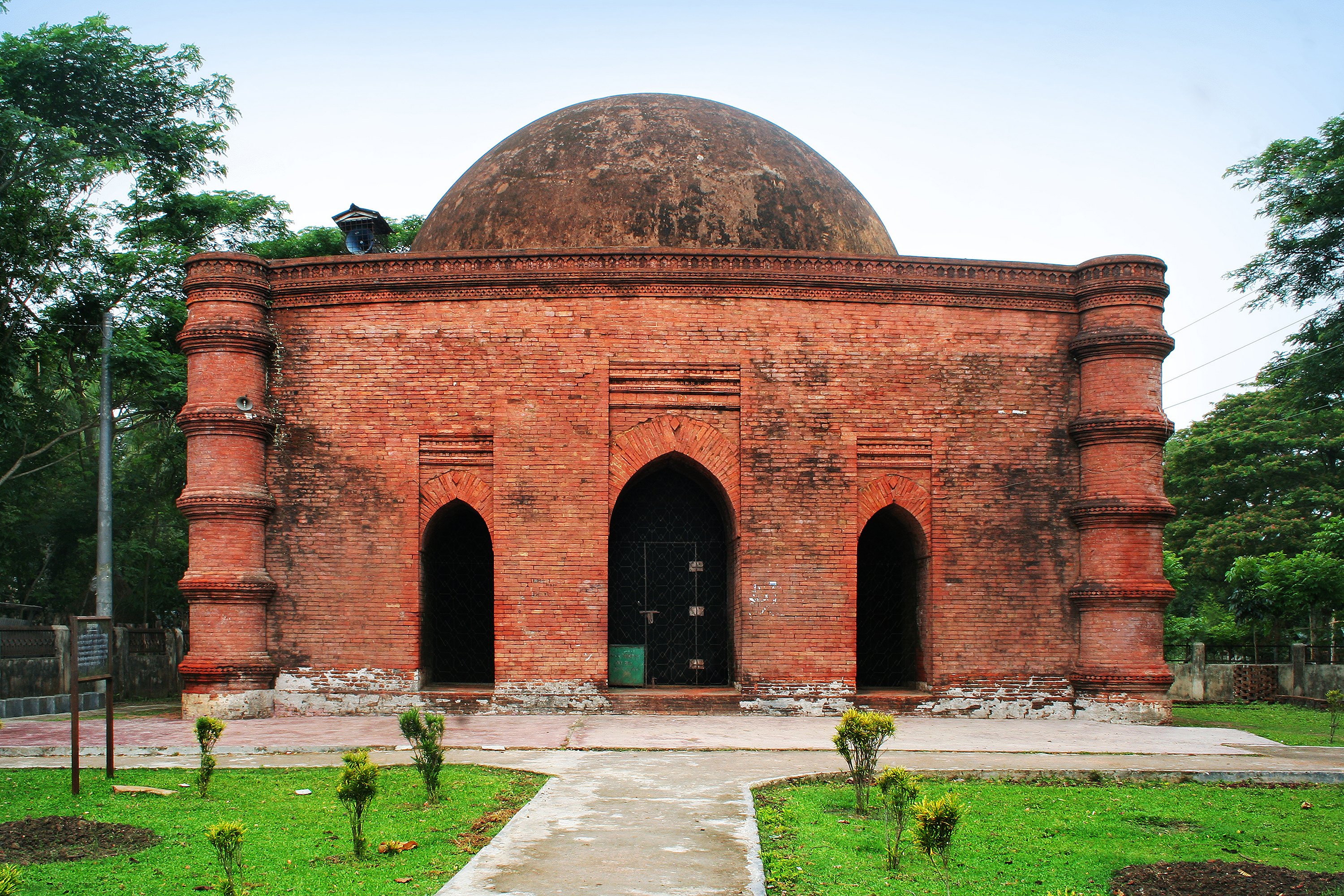 সিংগার মসজিদ,বাগেরহাট সদর,খুলনা,বাংলাদেশ।